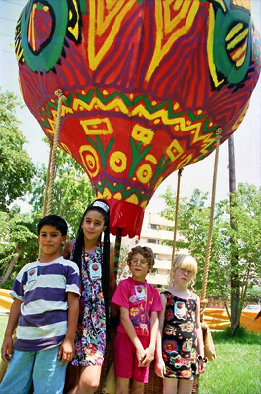 כדור פורח ערוץ הילדים